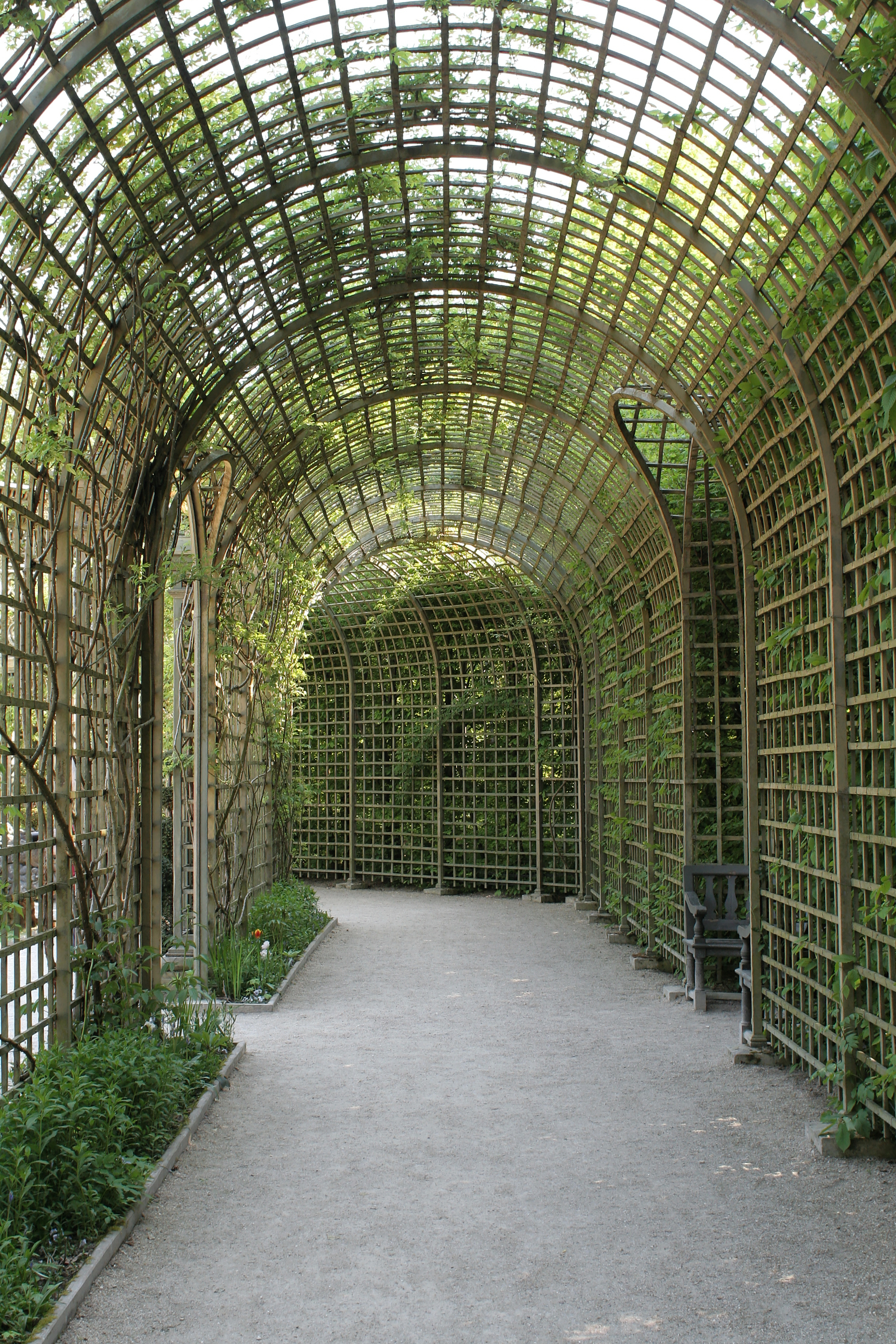 Parc de Versailles, bosquet de l'Encelade. Treillage, galerie octogonale qui fait le tour du bassin.